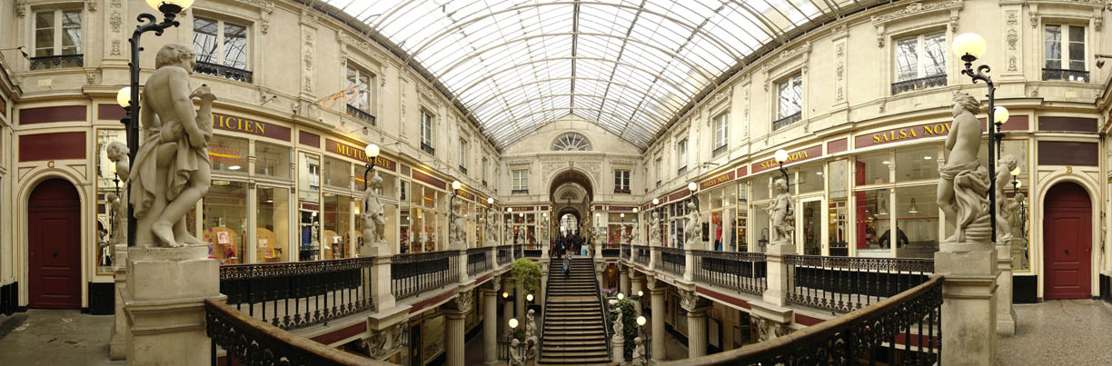 Photo panoramique du passage Pommeraye, à Nantes. Photo personnelle.